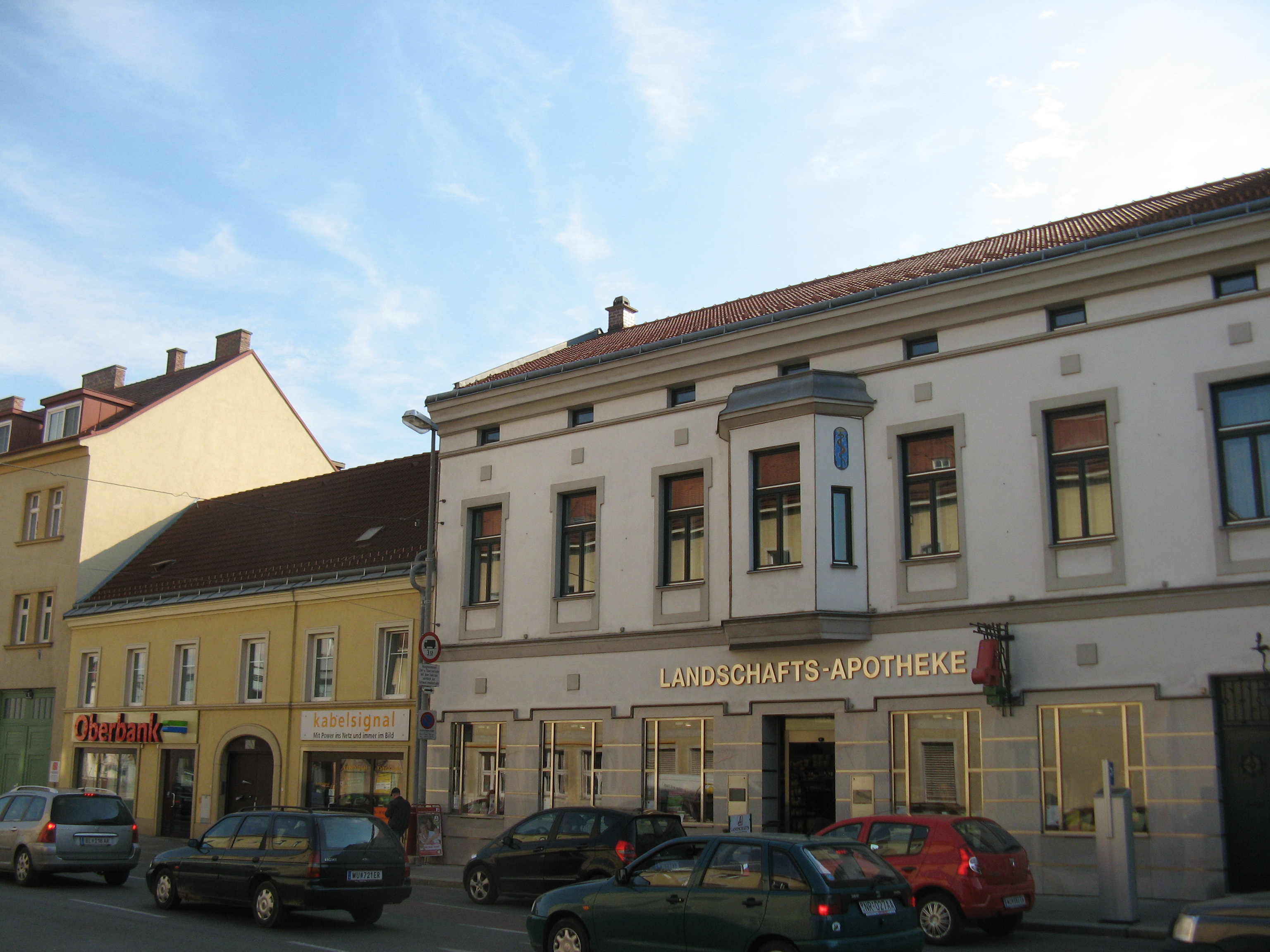 Häuser, Wiener Straße 3-5, Schwechat